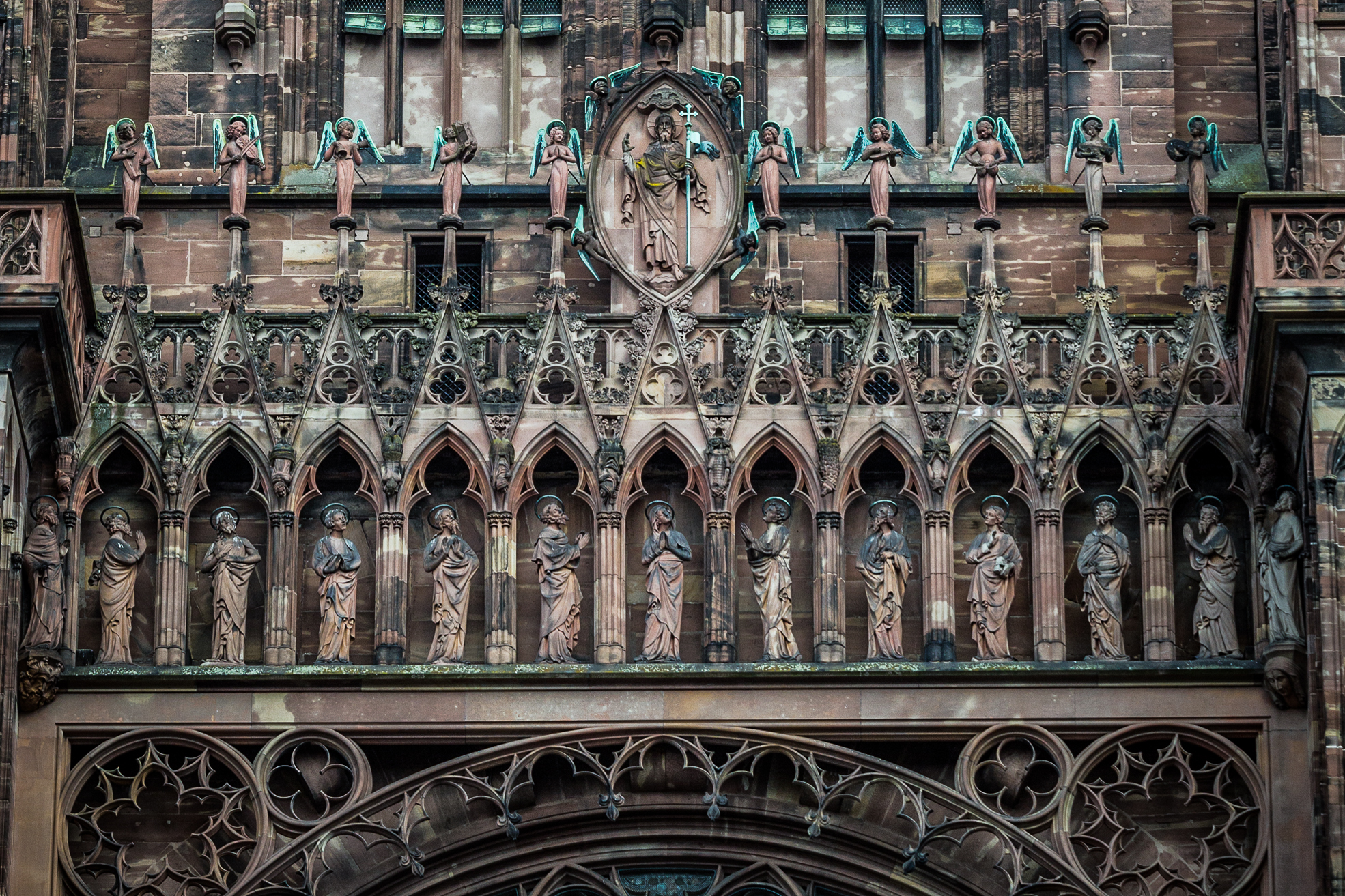 Galerie des apôtres Cathédrale Notre-Dame Strasbourg